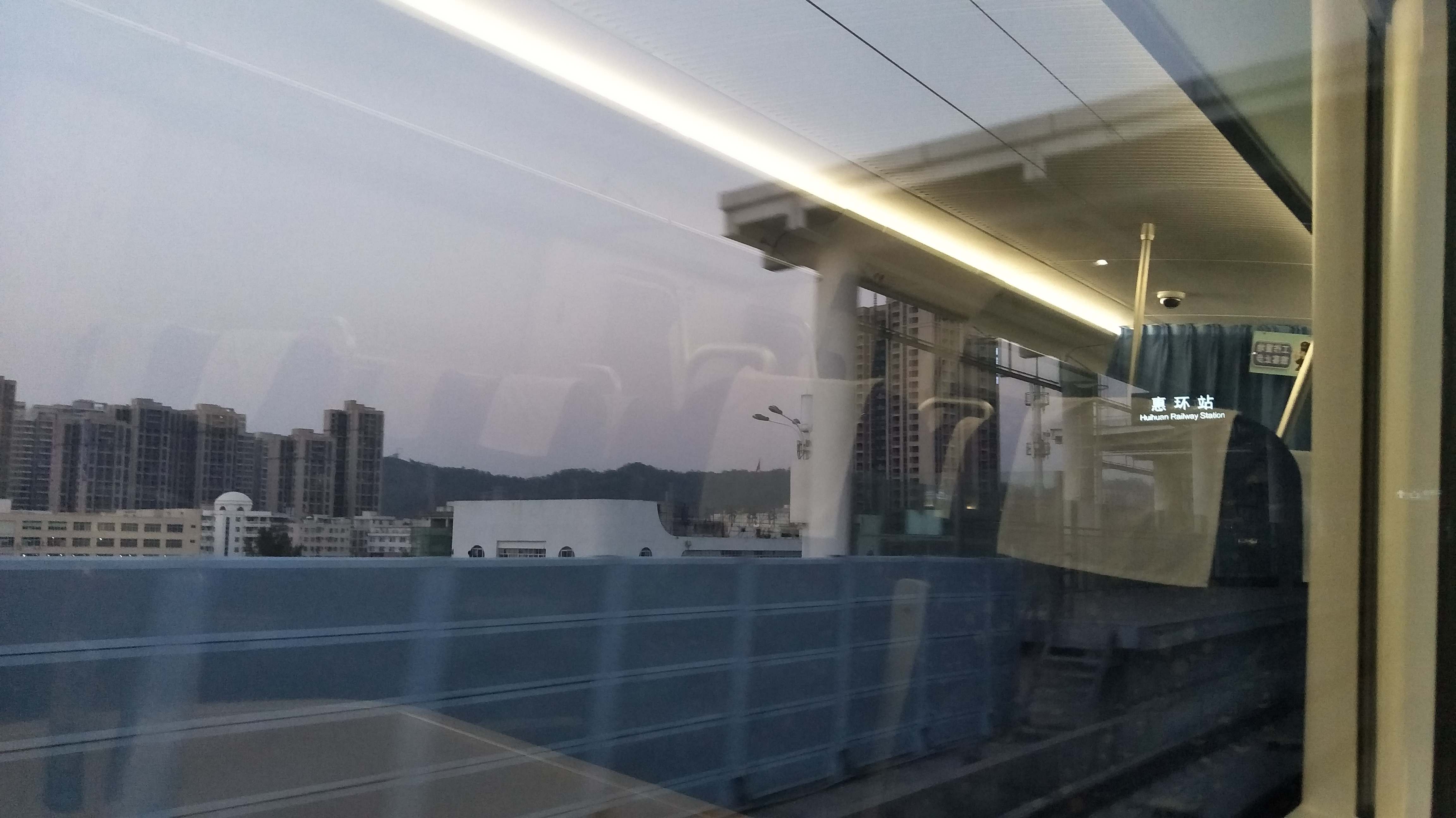 列车驶入惠环站的月台